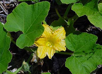 bloem van pompoen (foto Wouter Hagens)